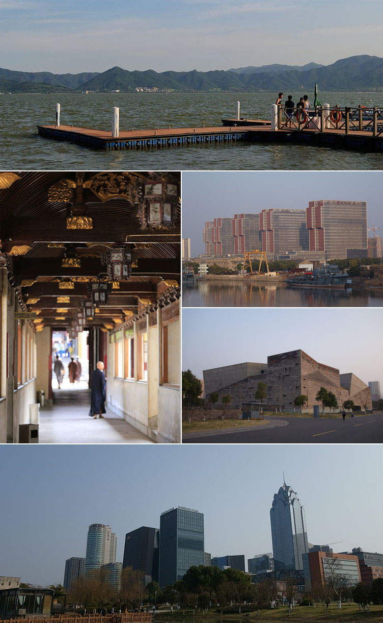 宁波市鄞州区拼贴画